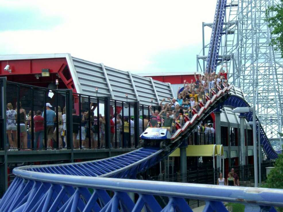 Millennium Force , montagnes russes à Cedar Point